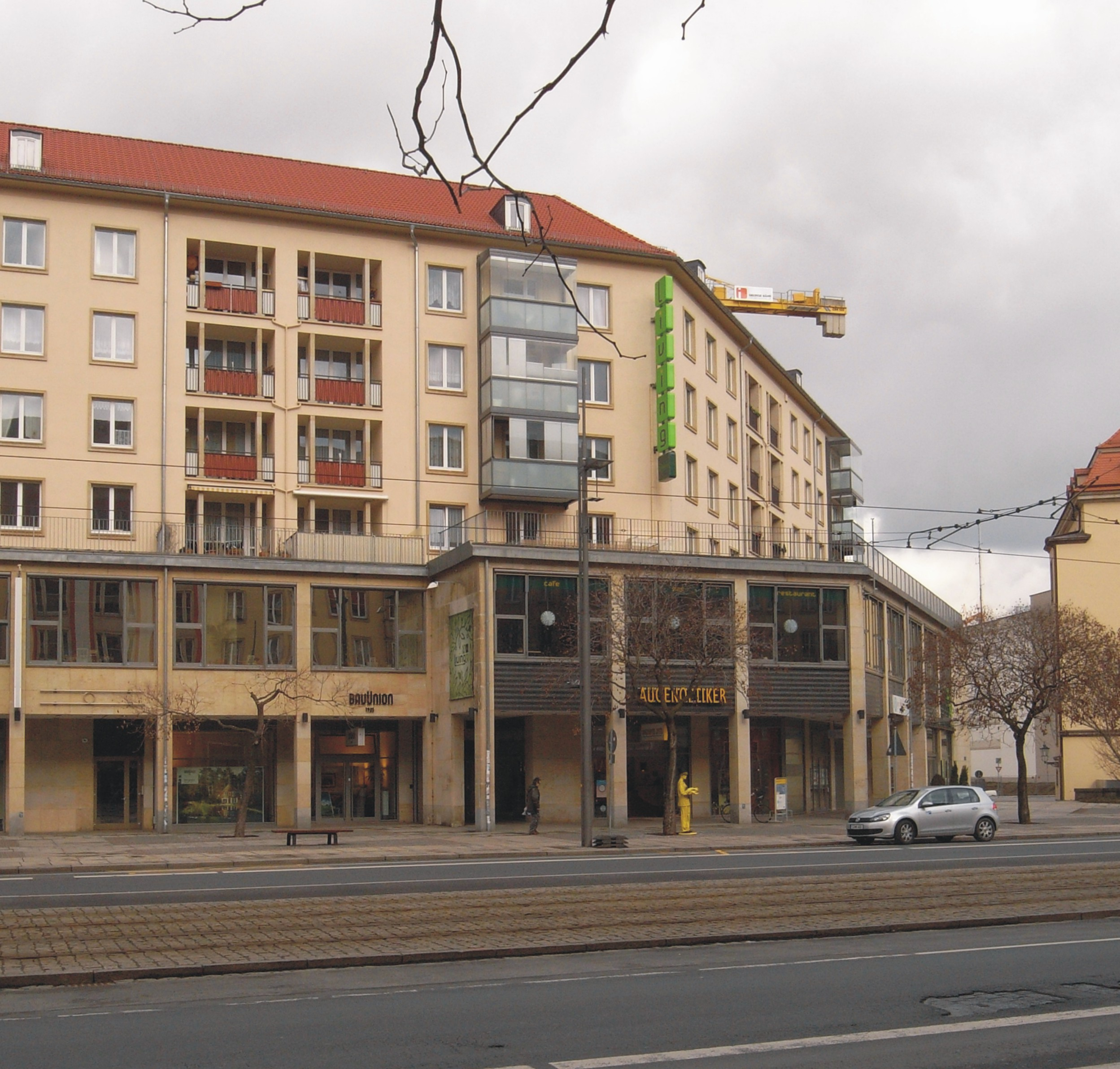 Wilsdruffer Straße, Gebäude mit dem ehemaligen Restaurant Szeged (Dresden, Sachsen, Deutschland)